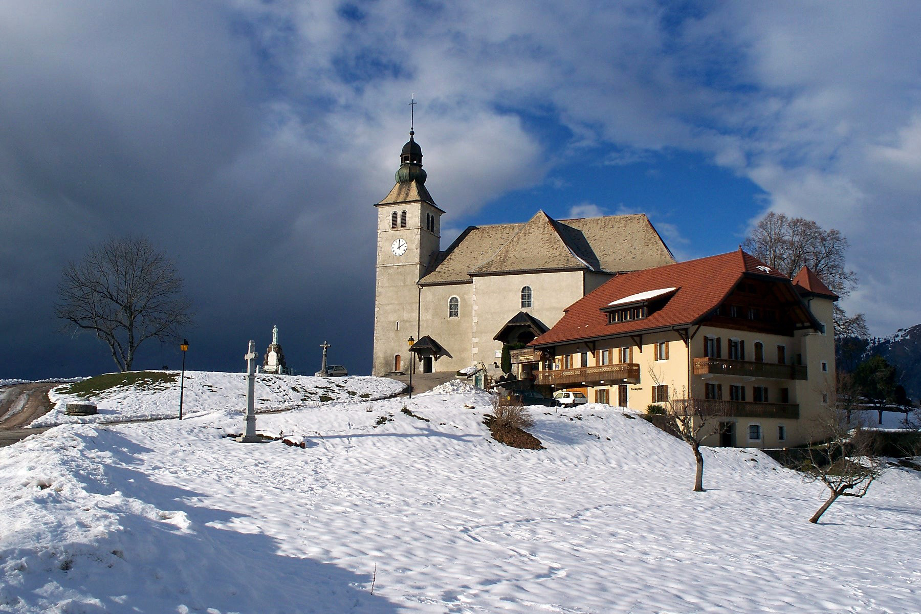 L'église de Mont-Saxonnex